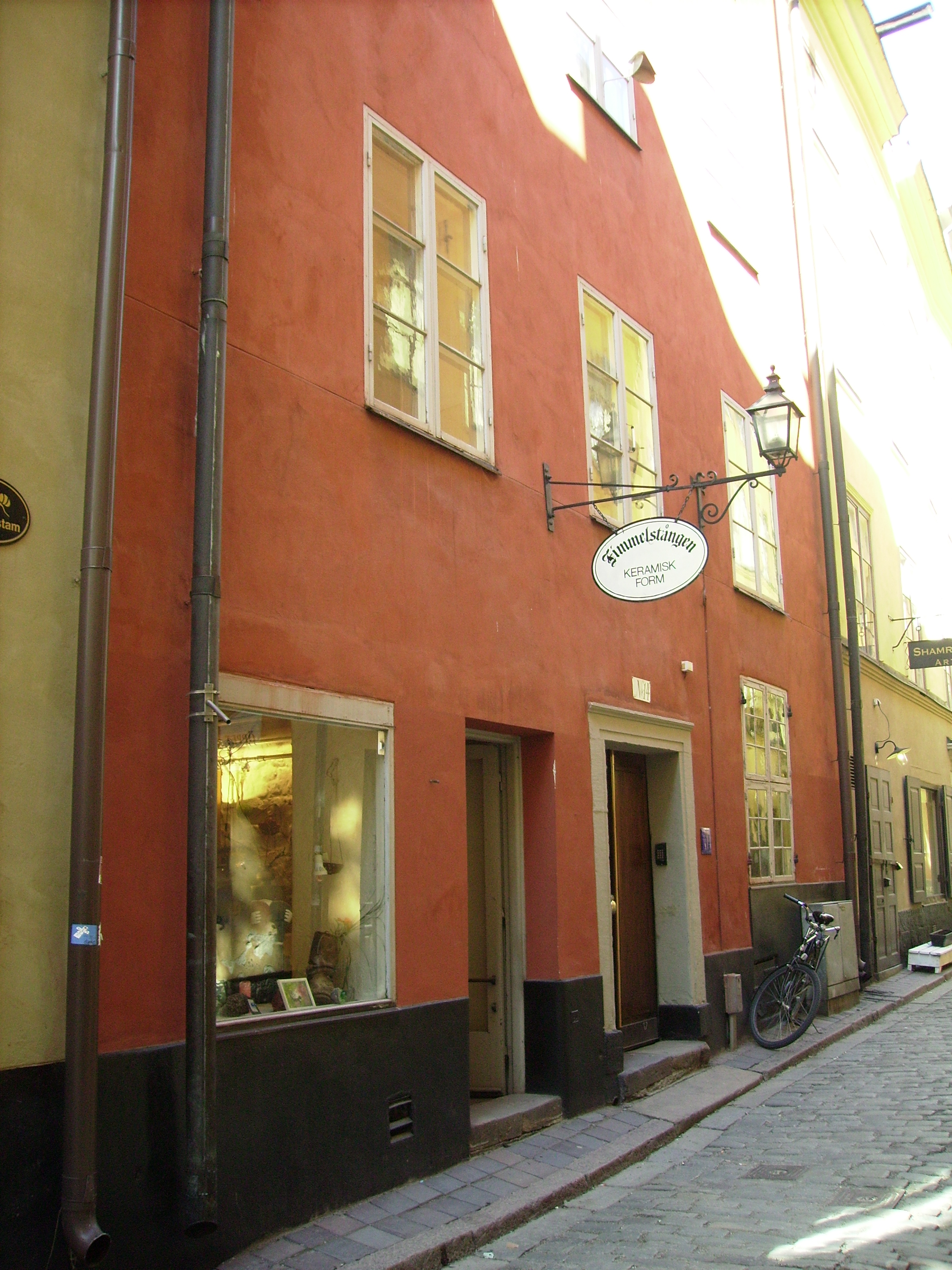 Kindstugatan 14.